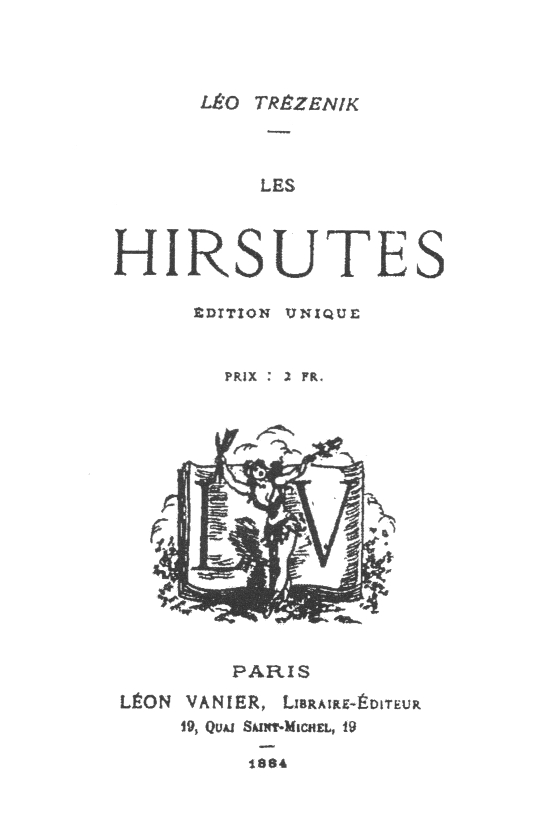 Page de titre de Les Hirsutes, de Léo Trézenik (Léon-Pierre-Marie Épinette), édité en 1884 chez Léon Vanier.